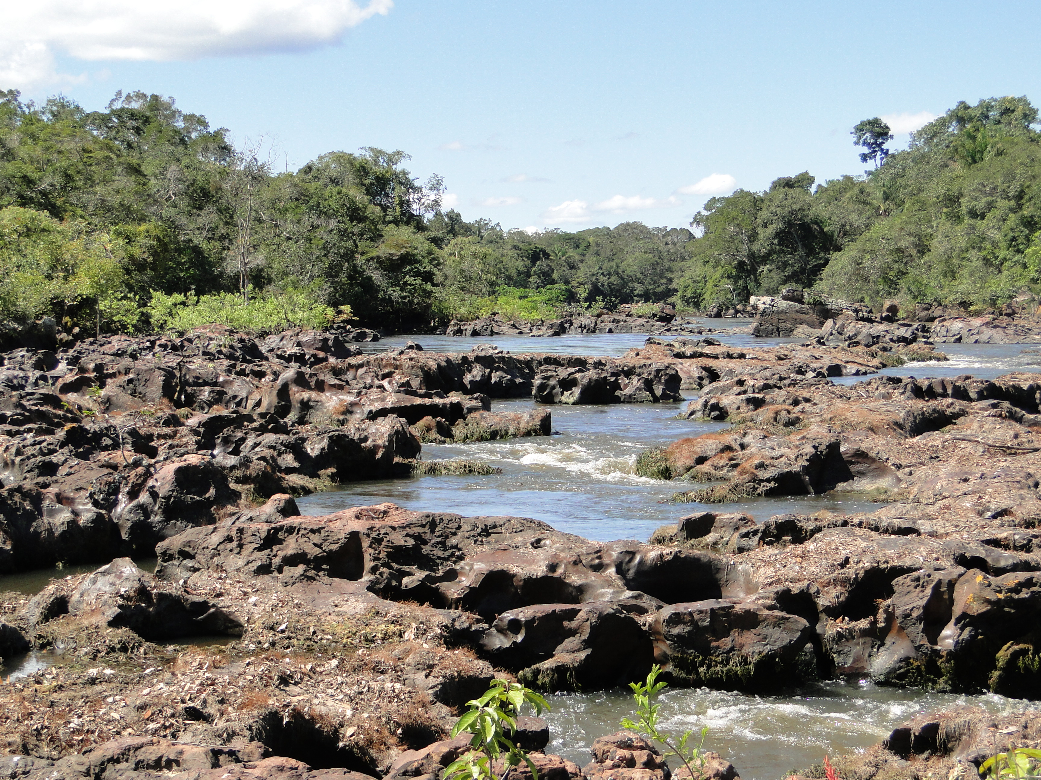 Rio Cautário no período das secas.